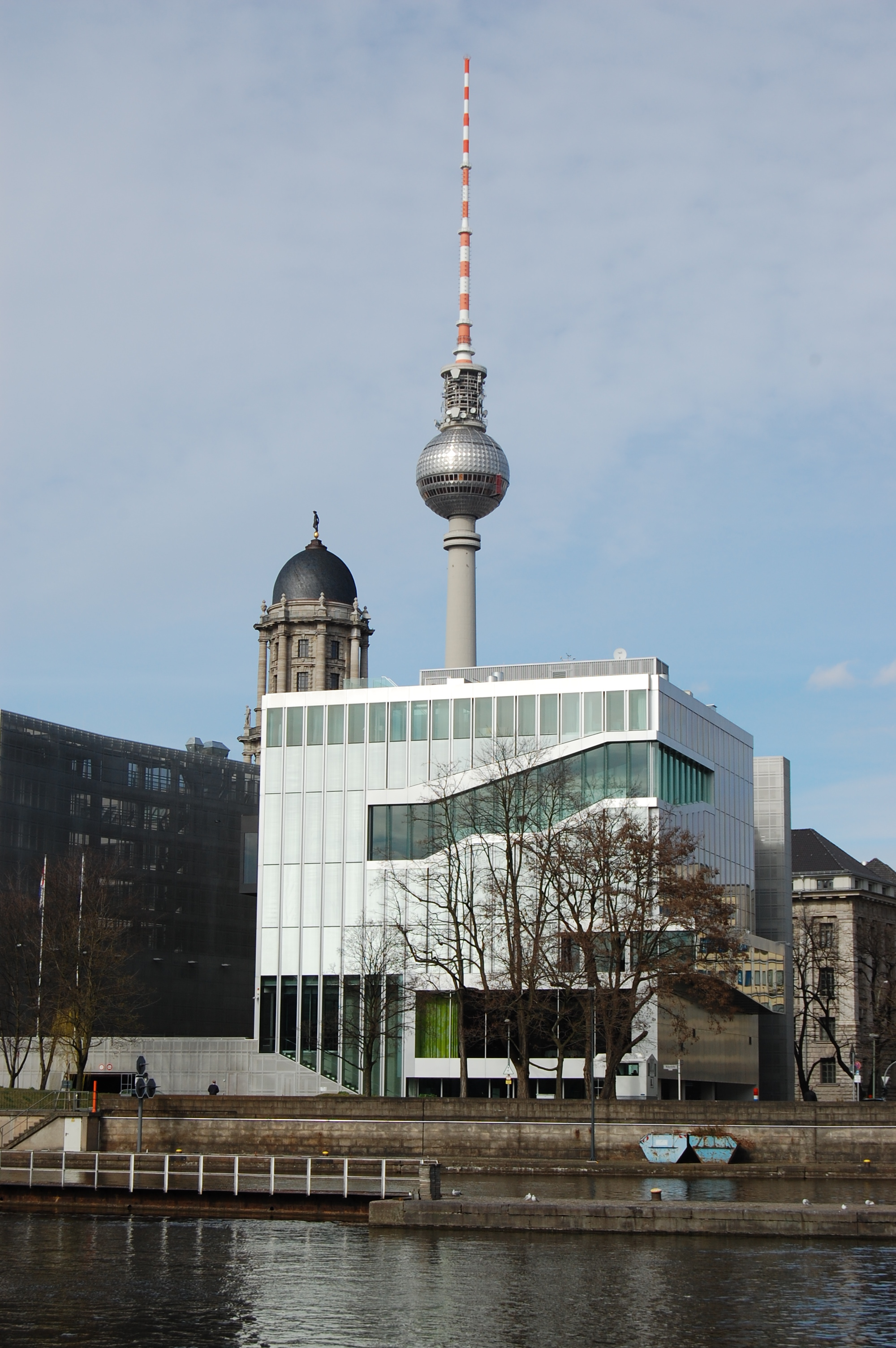 Dutch Embassy in Berlin